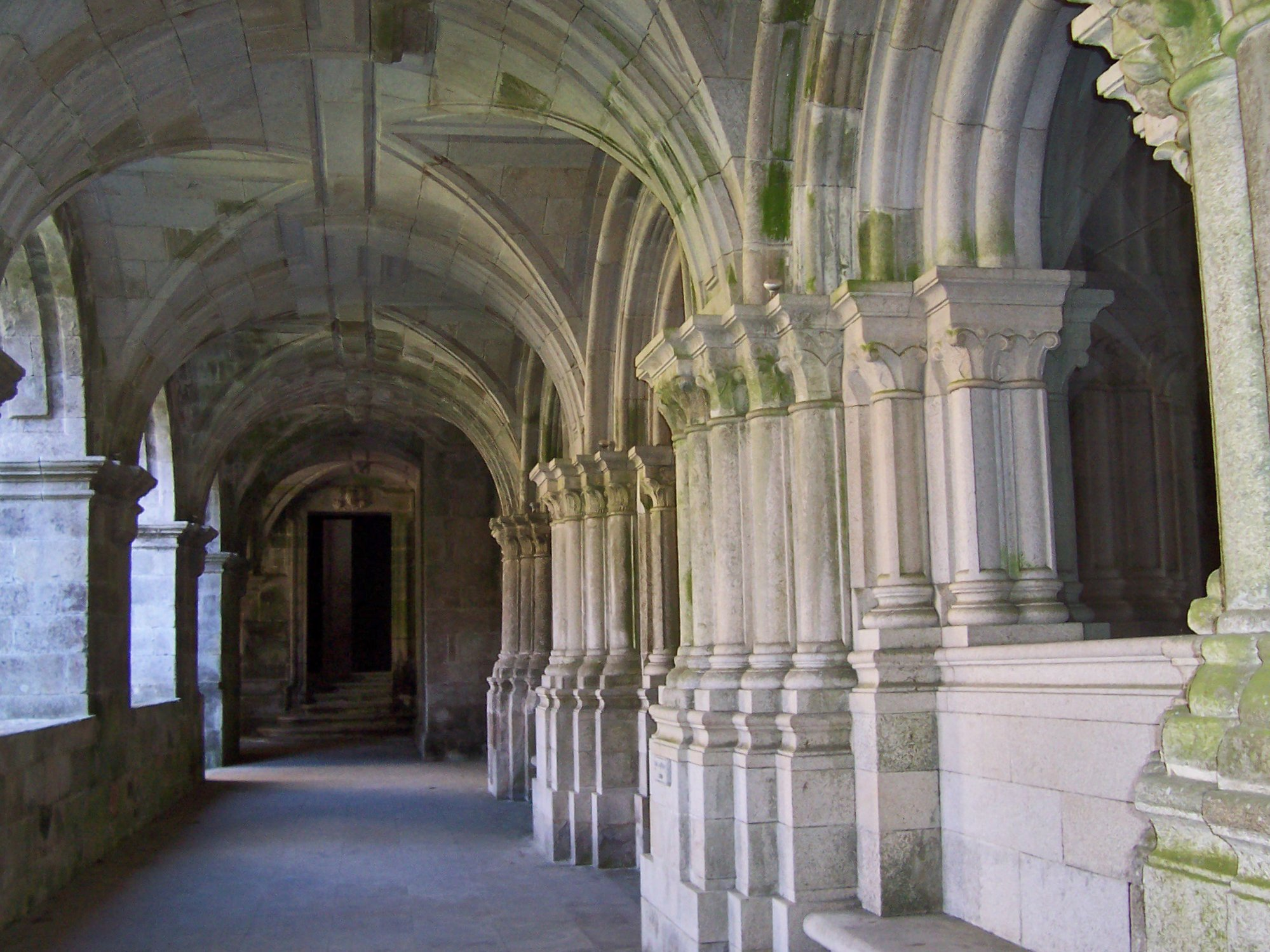 Santa María de Sobrado